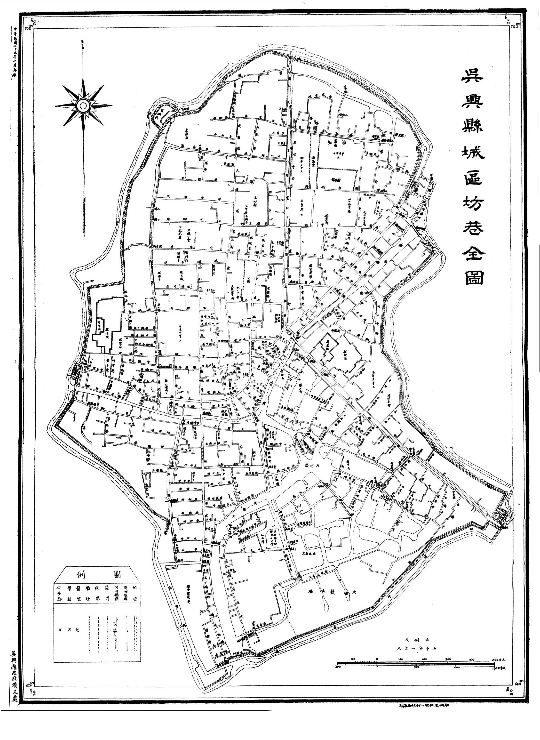 吳興縣城區坊巷全圖，吳興縣政府清丈處於中華民國二十五年（1936年）七月再版，影印自2009年出版的《湖州古舊地圖集》。